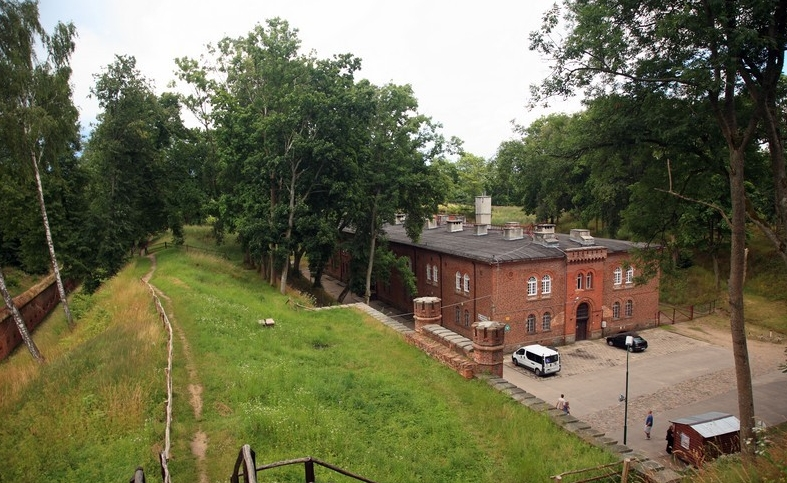 Giżycko, Twierdza Boyen